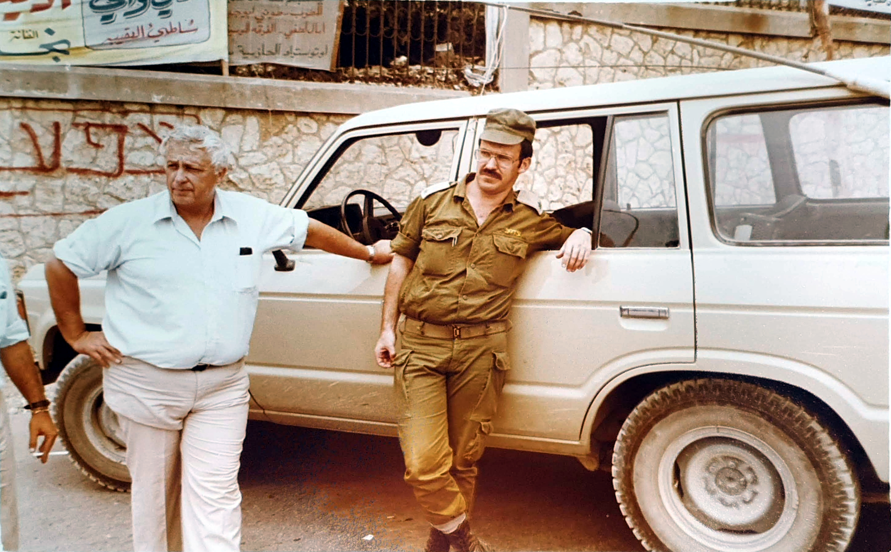 עודד שמיר (מ"מ המזכיר הצבאי של שר הביטחון) ואריק שרון (שר הביטחון) במבואותיה של ביירות במהלך מלחמת לבנון הראשונה